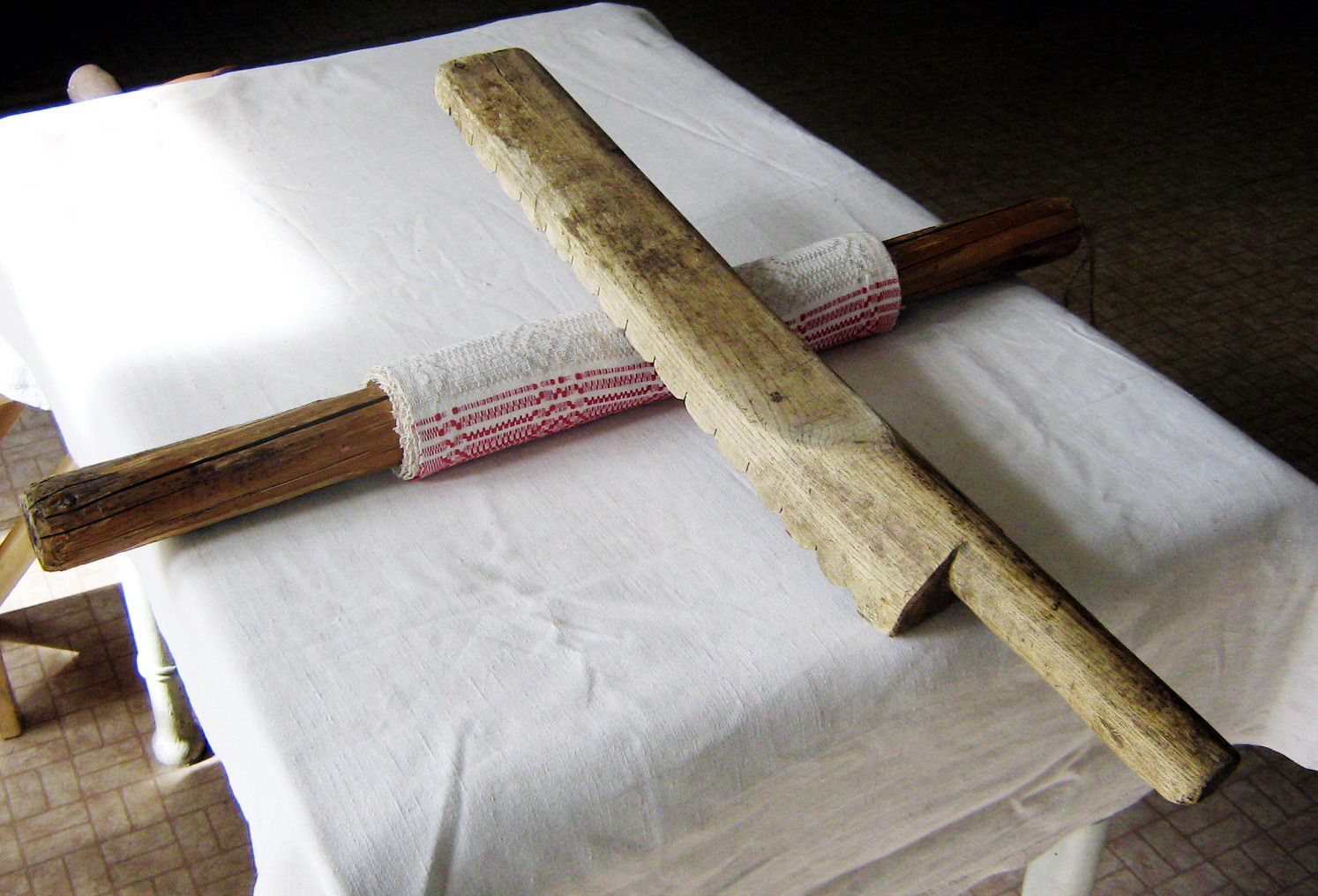 Kočėlas Foto: Algirdas, 2007 m. gegužės 16 d., Lietuva